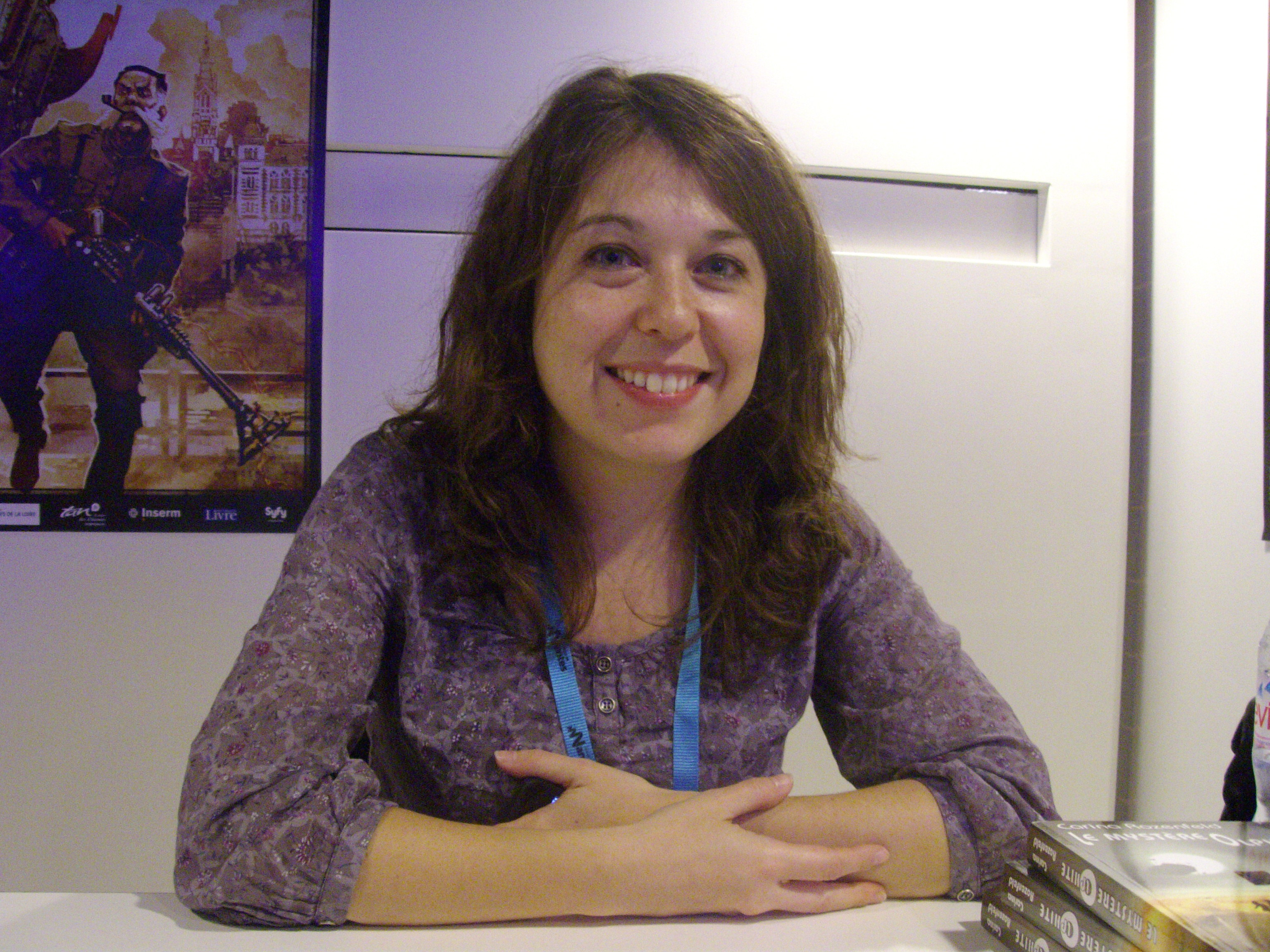 Carina Rozenfeld aux Utopiales 2011